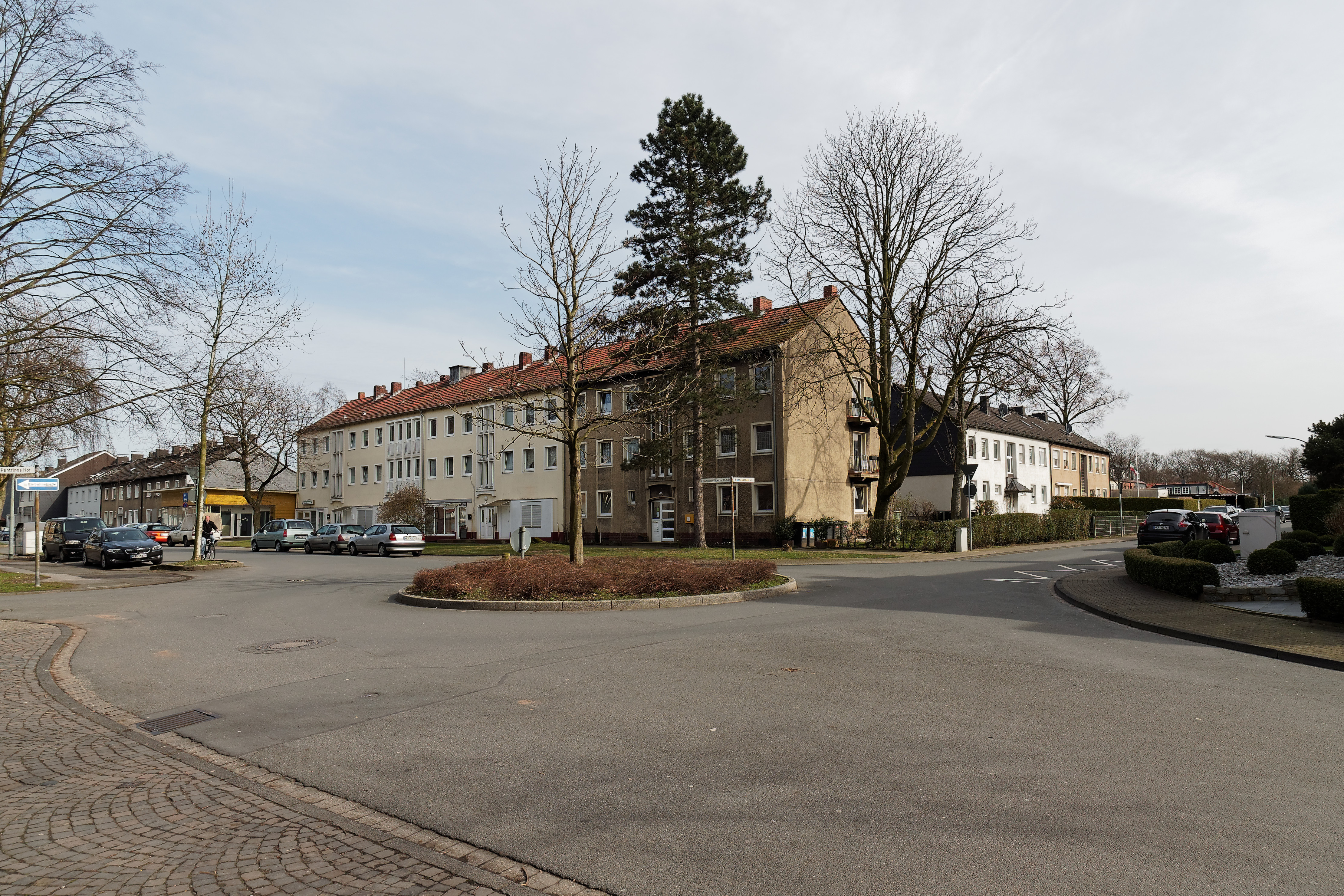 Das Zentrum der Siedlung Pantringshof in Herne-Pantringshof, Standort Eberhard-Wildermuth-Straße 43.